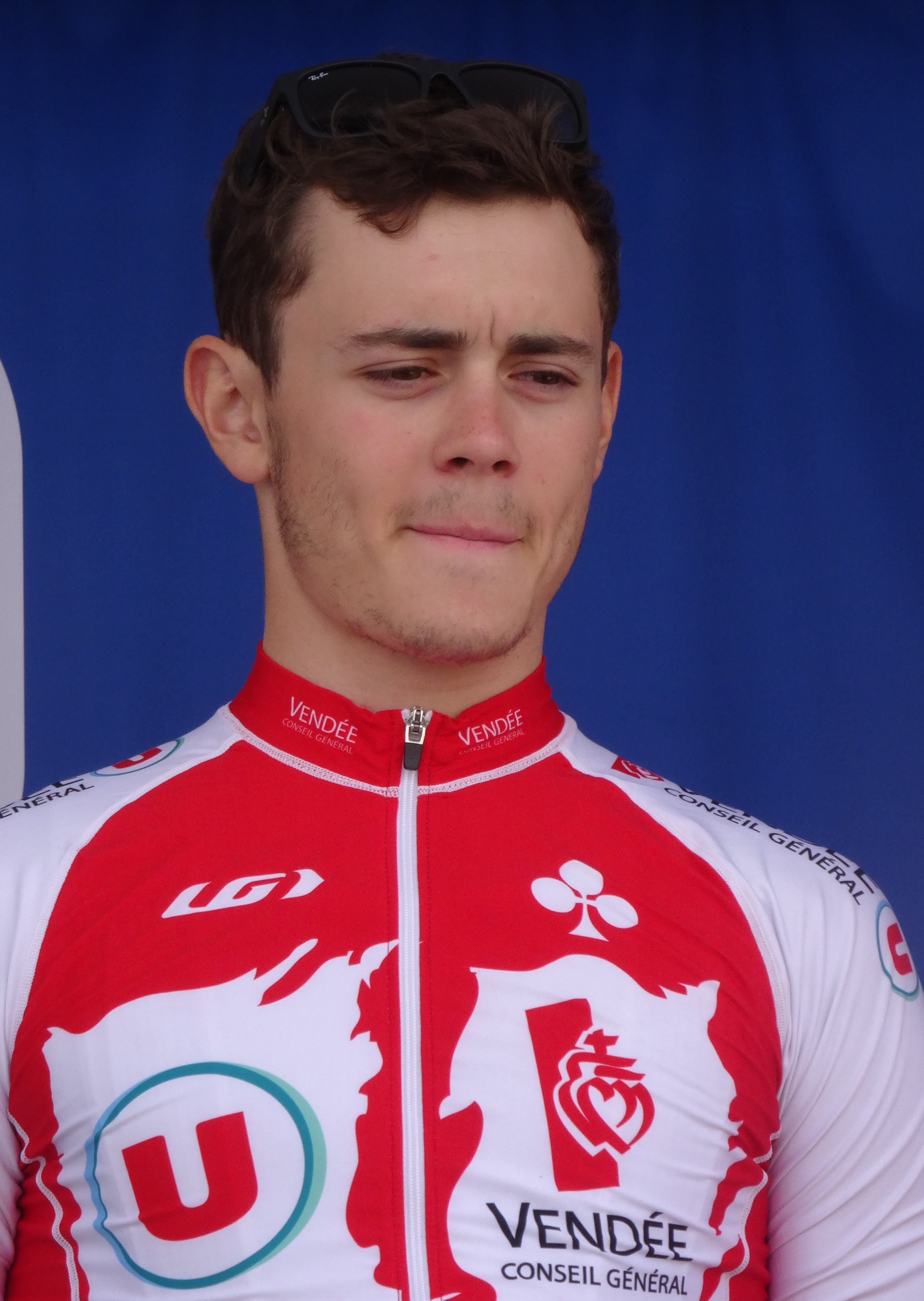 Reportage photographique réalisé le dimanche 25 mai 2014 à l'occasion du départ et de l'arrivée de la troisième étape du Paris-Arras Tour 2014 à Arras, Pas-de-Calais, Nord-Pas-de-Calais, France. Depicted person: Thomas Boudat